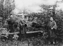 「東皐園」での上島正（中央） 熊沢猛所蔵